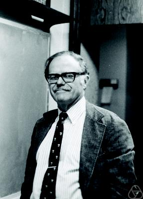 Foto di Edwin Hewitt